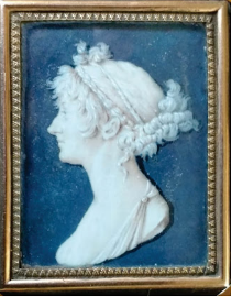 Camée représentant Anne-Marie-Rose-Louise Pinon , fille d'Anne-Louis III Pinon vicomte de Quincy